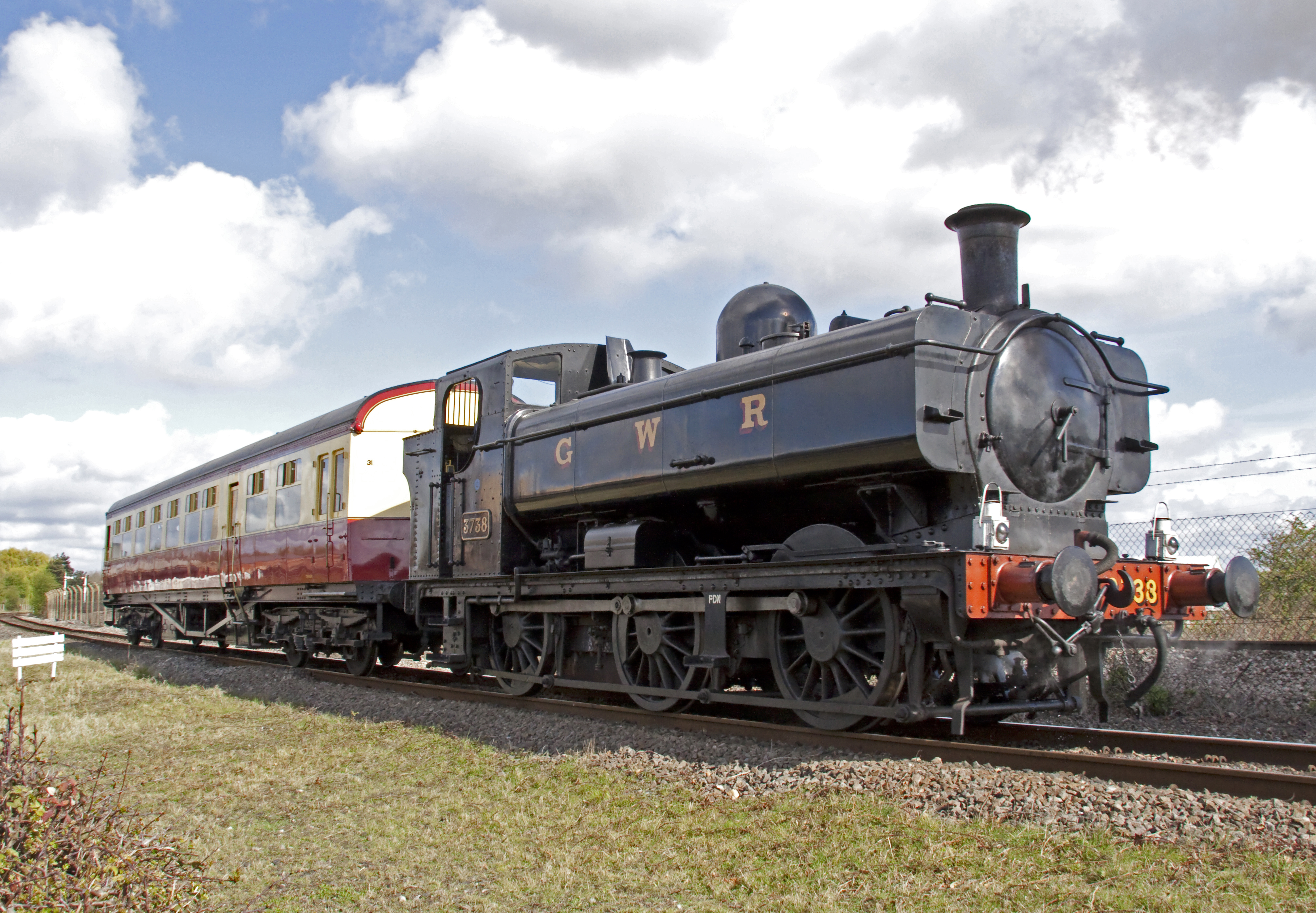 Pannier Tank Engine 3738 6